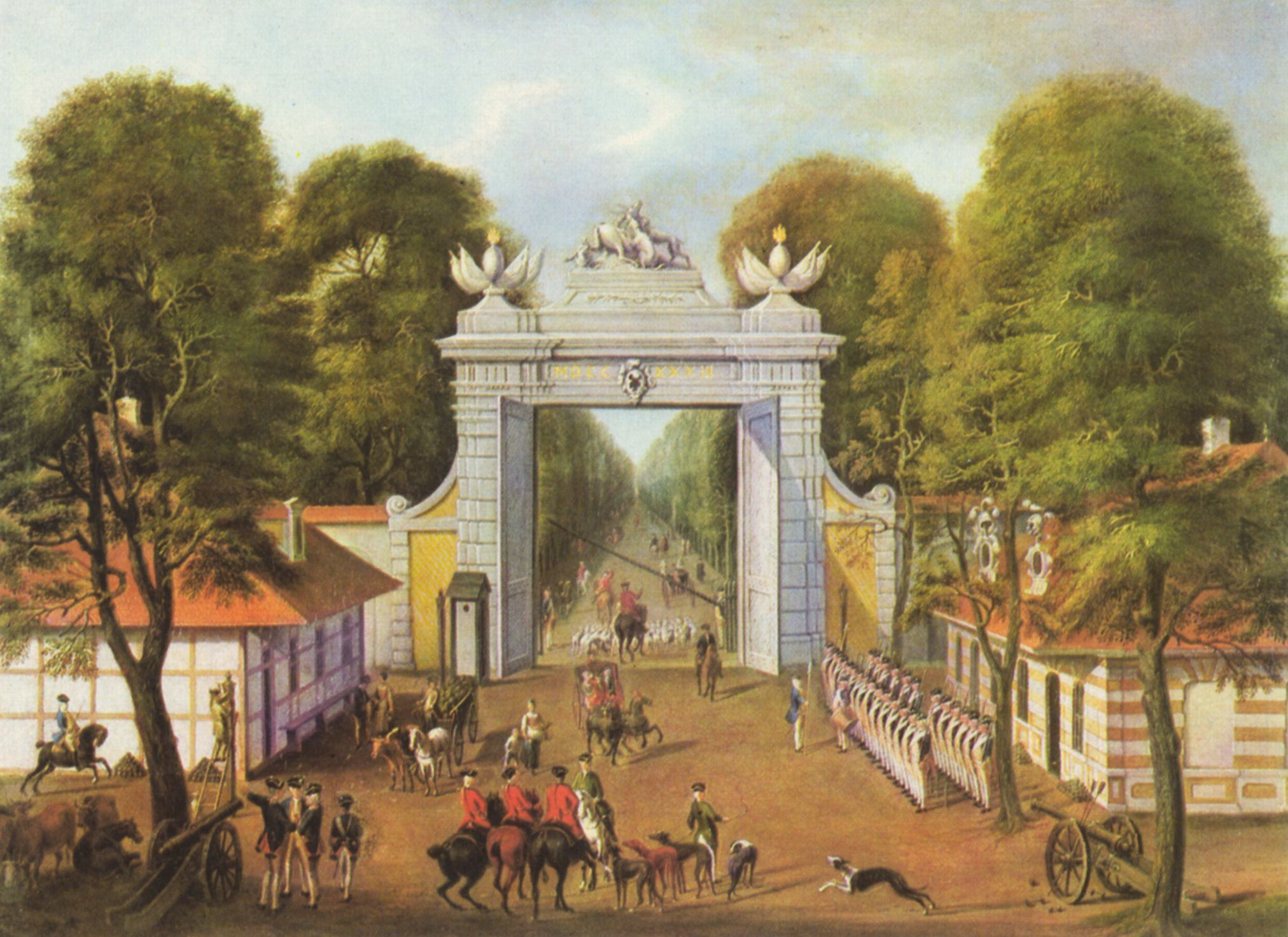 Das Gemälde hing ab 1741 im Tafelsaal des Potsdamer Stadtschlosses. Das Jägertor ist von zwei Gebäuden begrenzt, dem Wachlokal (mit herausgetretener Wachkompanie) auf der östlichen und dem Steuerhaus auf der westlichen Seite begrenzt.